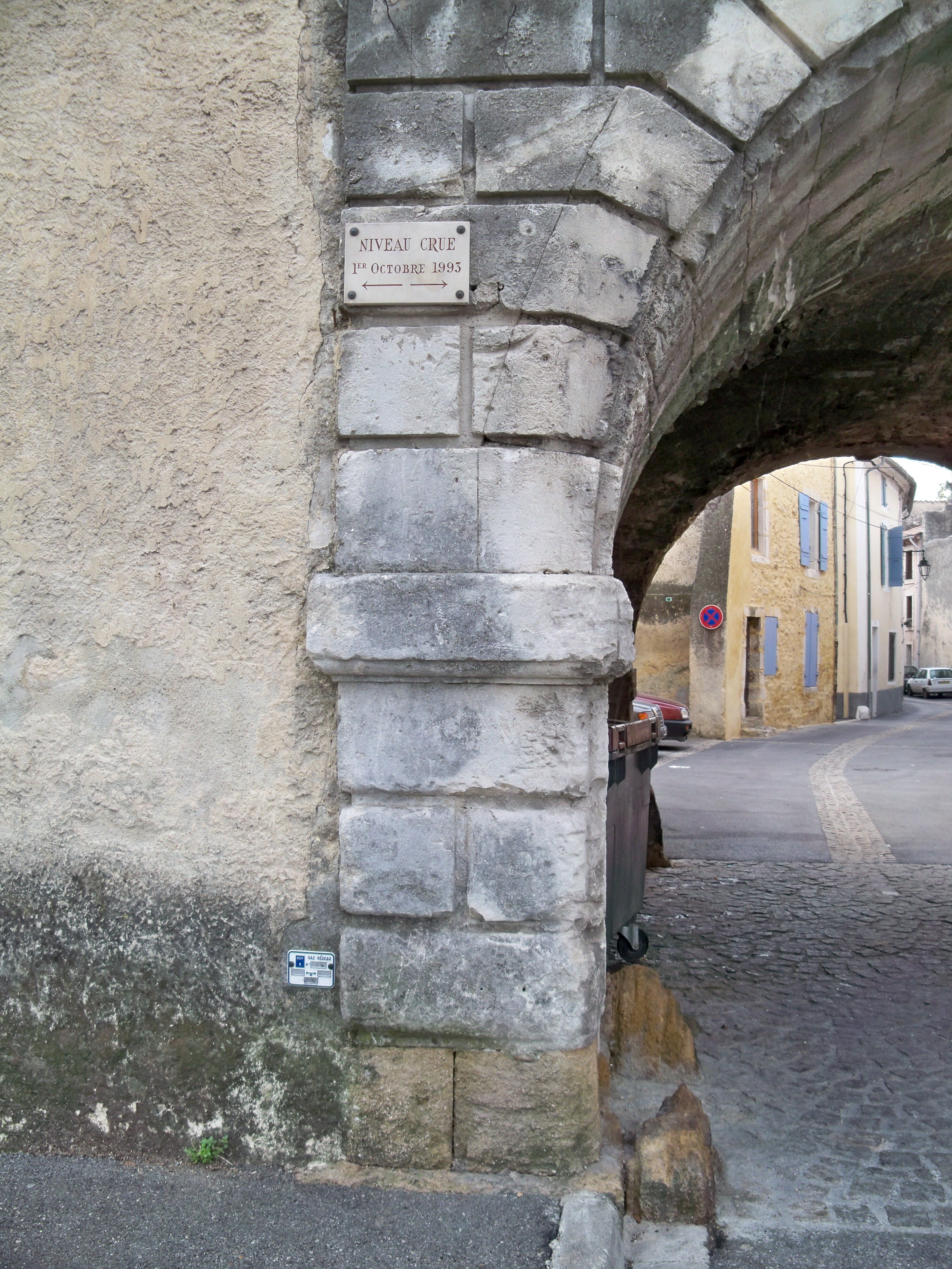 Niveau de crue à Bollène (84) en 1993